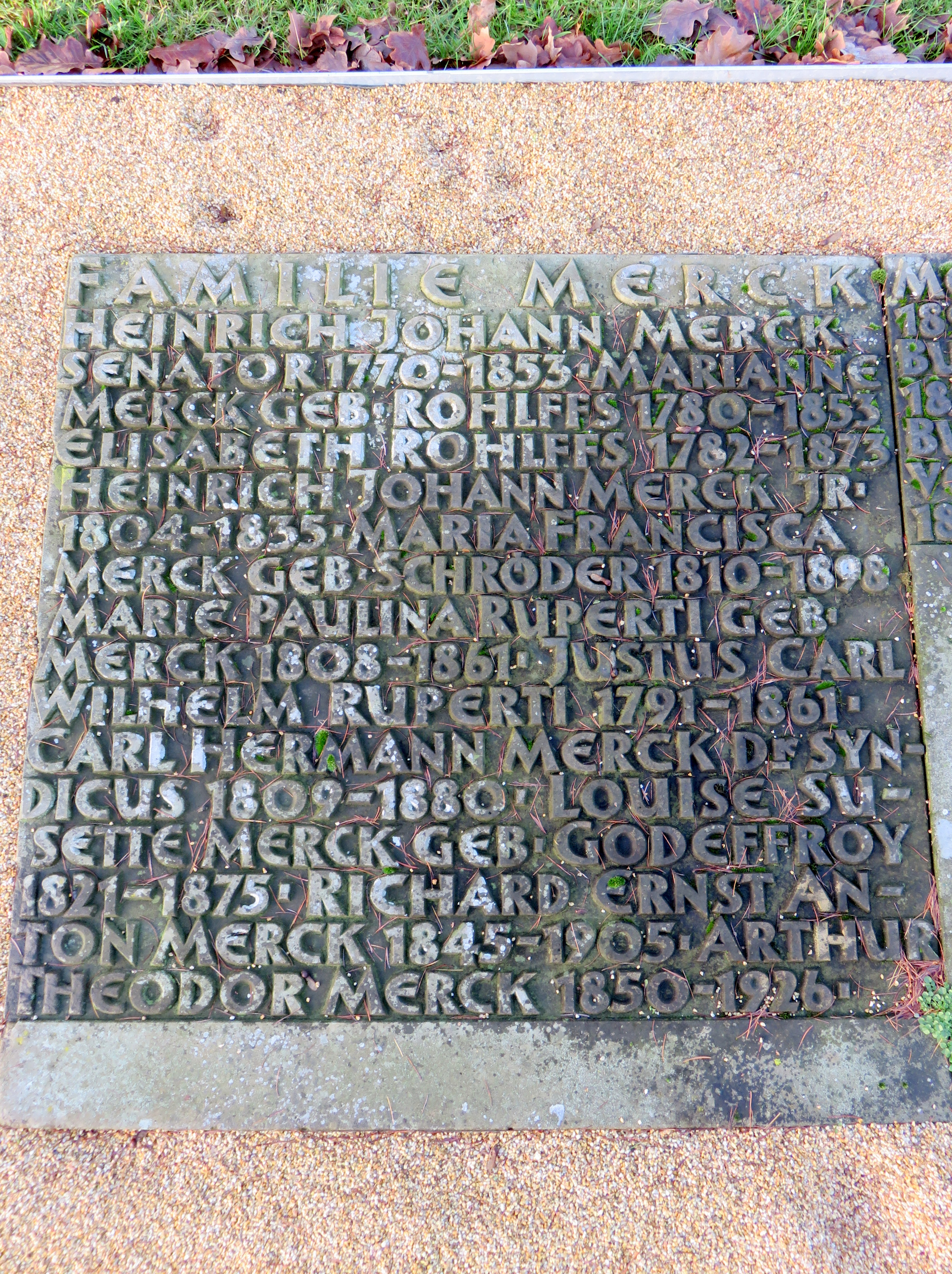 Doppel-Sammelgrab Familie Merck im Bereich des Althamburgischen Gedächtnisfriedhofs auf dem Hamburger Friedhof Ohlsdorf zu Ehren von unter anderen : Heinrich Johann Merck, seiner zweiten Ehefrau Marianne geborene Rohlffs und seines ältesten Sohnes Heinrich Johann Merck (1804-1835) aus der Ehe mit seiner früh verstorbenen ersten Ehefrau, Justus Ruperti und seiner Ehefrau Marie Pauline geb. Merck, Carl Hermann Merck und seiner Ehefrau Louise Susette, geb. Godeffroy, Ernst Freiherr von Merck sowie seiner Schwester Molly Busse (1812-1897).